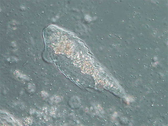 Hypermastigida / from University of Tsukuba, Tennodai, Tsukuba Ibaraki Pref., Japan / Microscope:Leica DMRD (DIC)